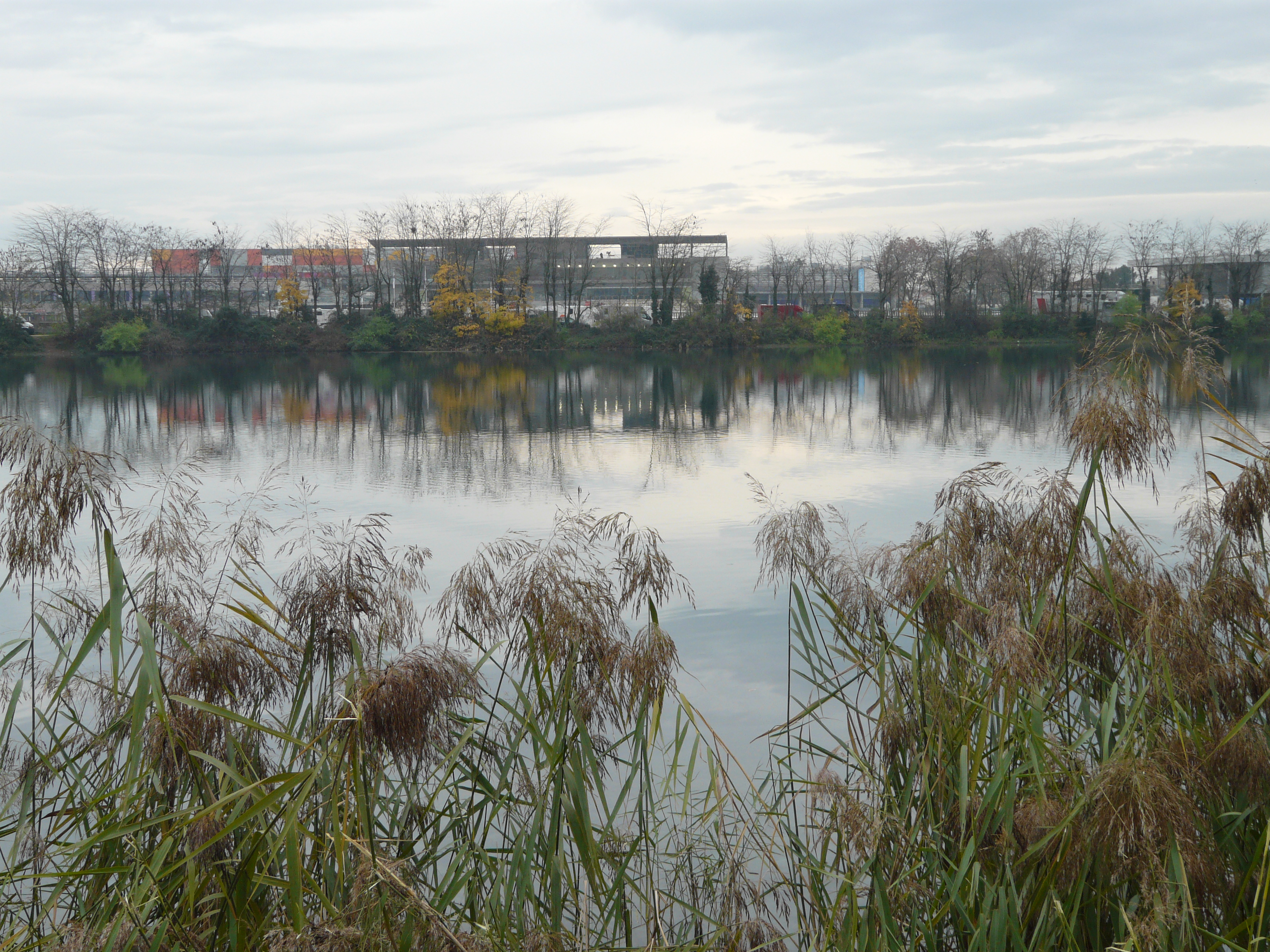 Le centre commercial du Carré de Soie (Vaulx-en-Velin) vu de l'autre rive du canal de Jonage